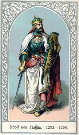 Adolf von Nassau